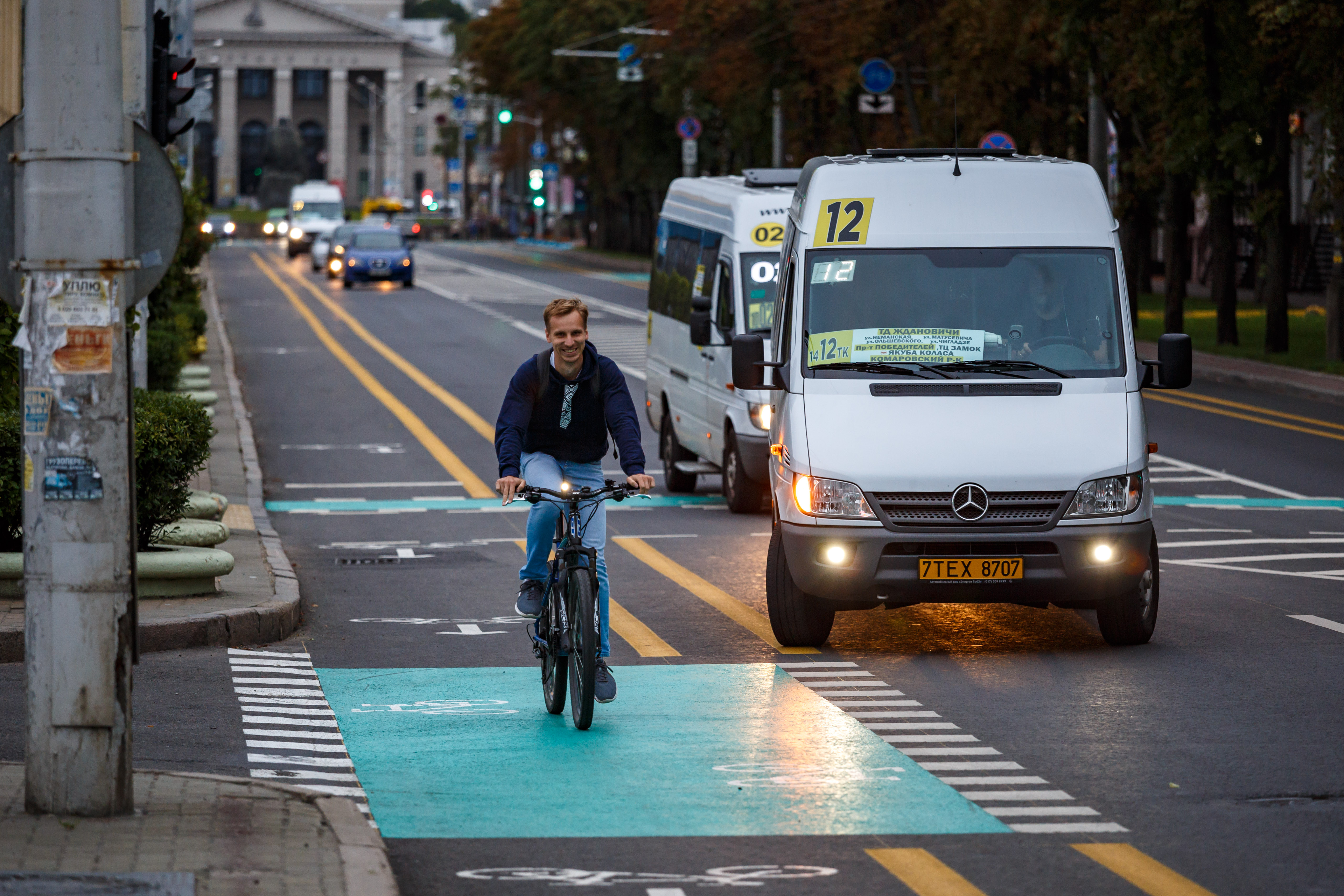 "Для пилотного проекта выбрали именно этот участок, потому что тут сконцентрировано большое количество проблем: плотный поток пешеходов на тротуаре, наличие подземных переходов, карман для маршруток, стихийная парковка автомобилей. В будущем проект может использоваться как типовое решение по преобразованию многих улиц Минска и других городов Беларуси для велосипедного движения." Дарья Косько, ecoidea.by